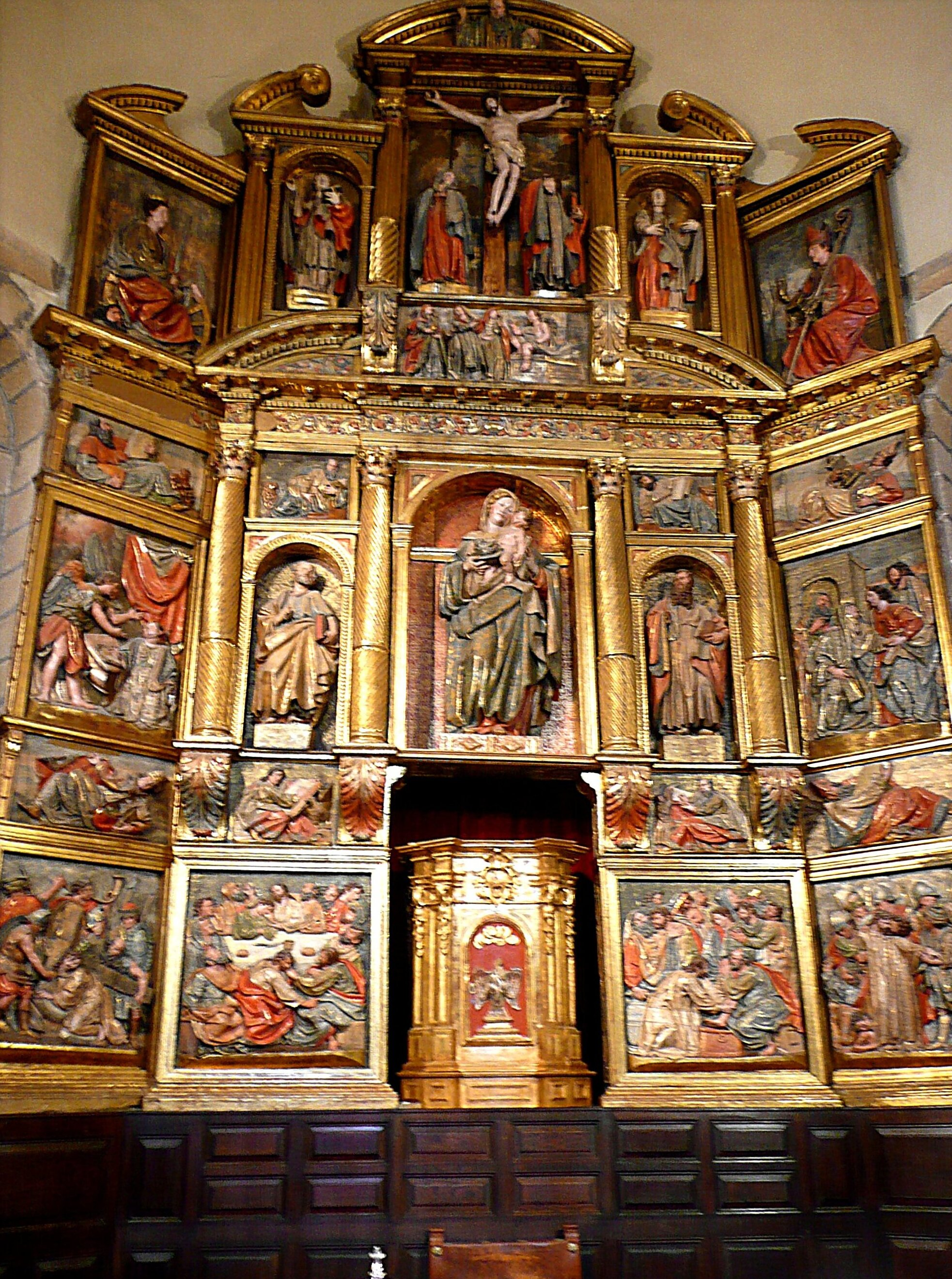 Retablo mayor de la Iglesia de Nuestra Señora de la Purificación de Gazólaz.